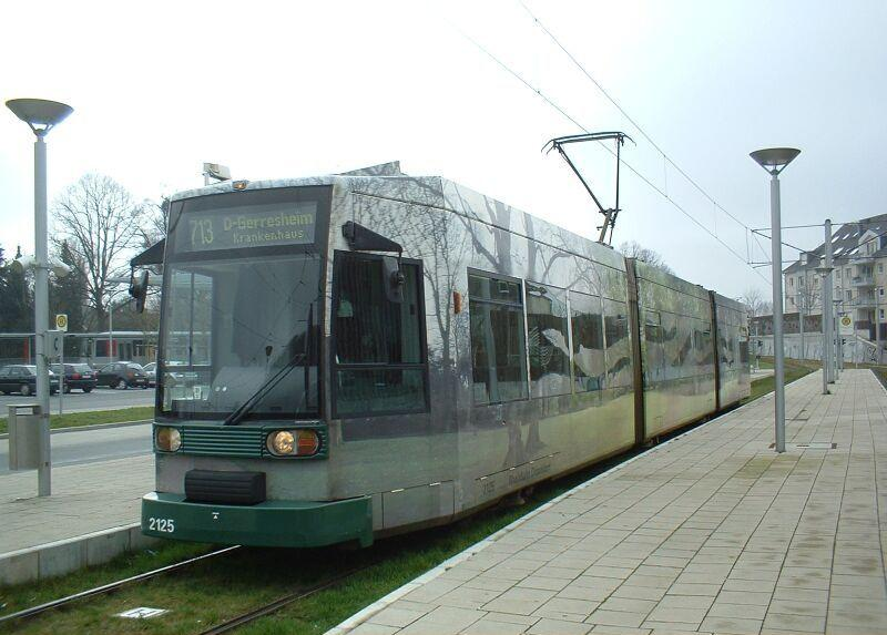 713 gerresheim krankenhaus